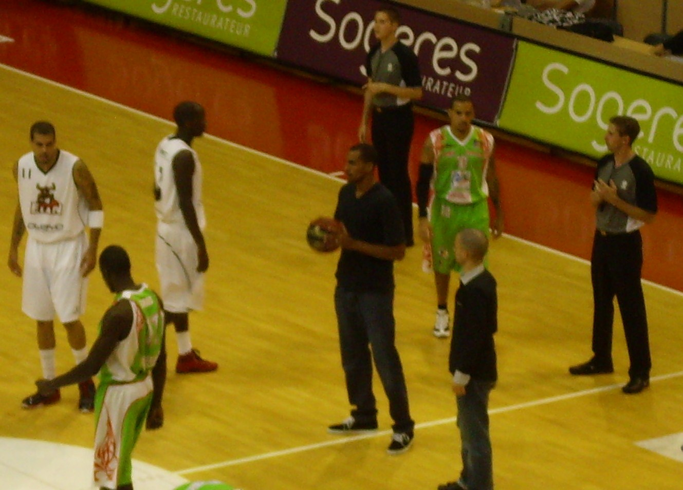 Thabo Sefolosha (avec le ballon) lors du match amical Elan Chalon - JL Bourg-en-Bresse